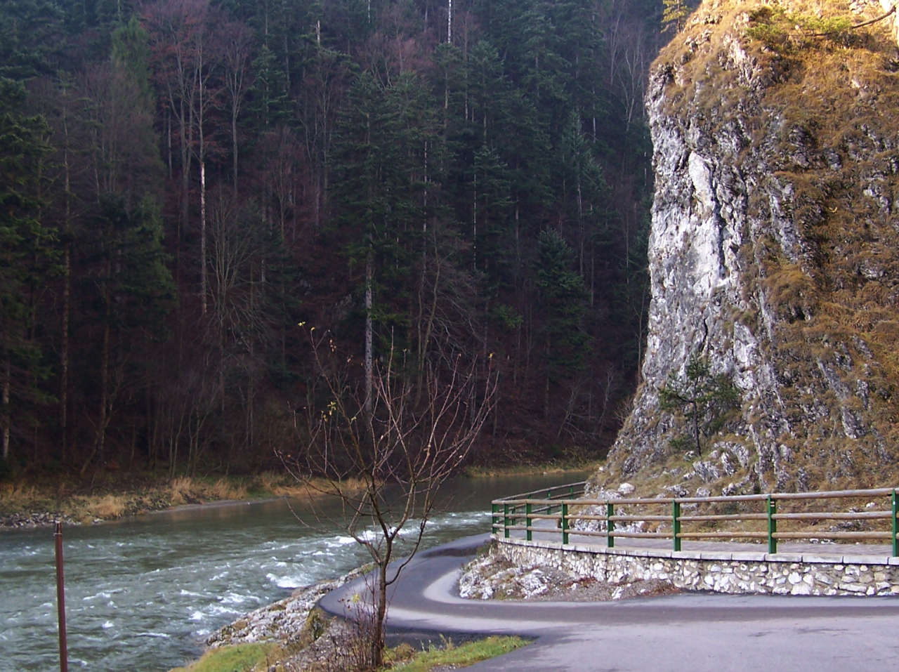 Wylizana (Pieniny)